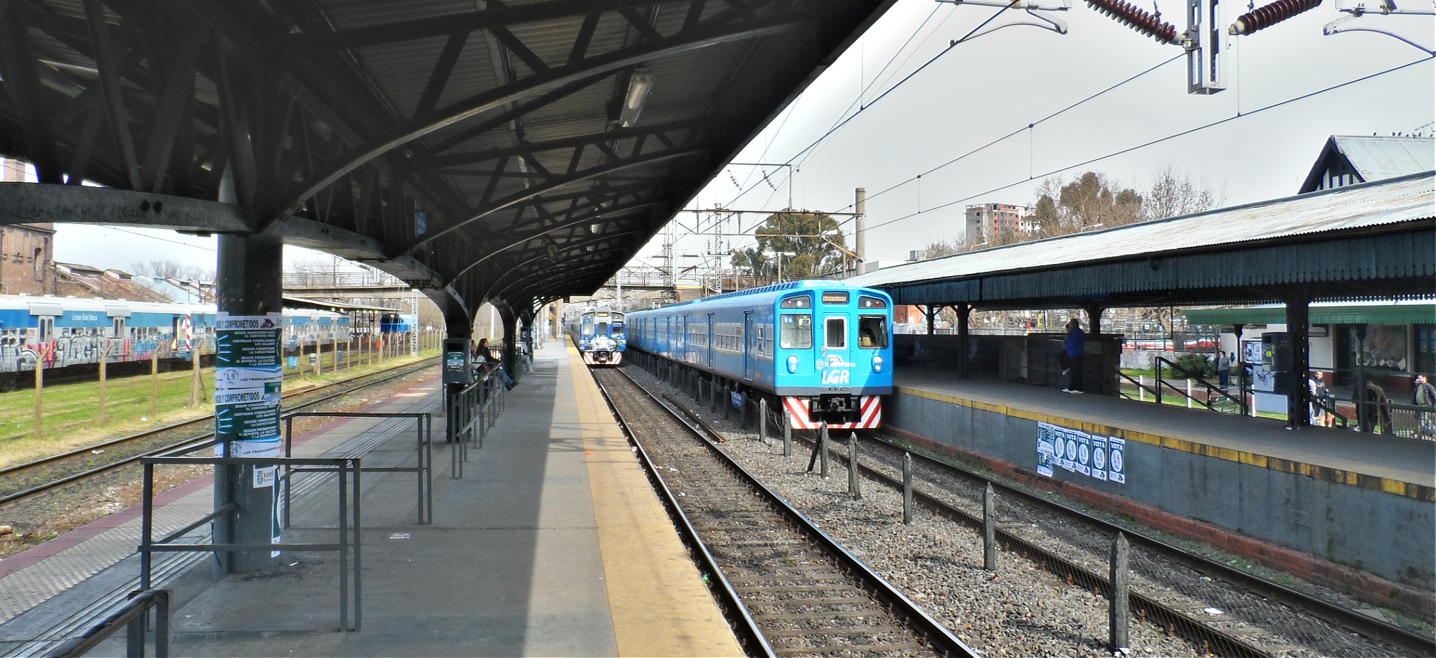 Estación Remedios de Escalada